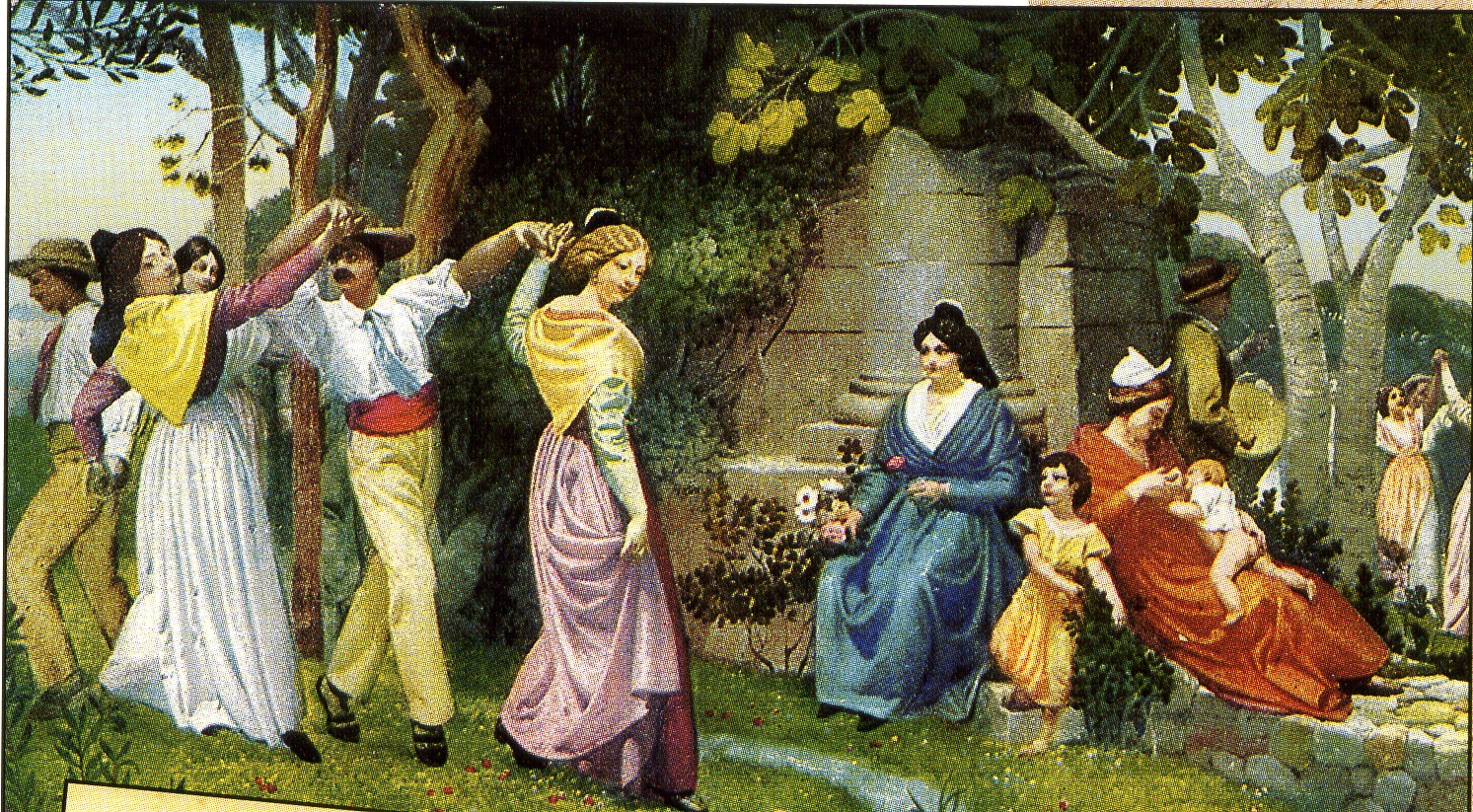 La Farandole par Valère Bernard Mucem